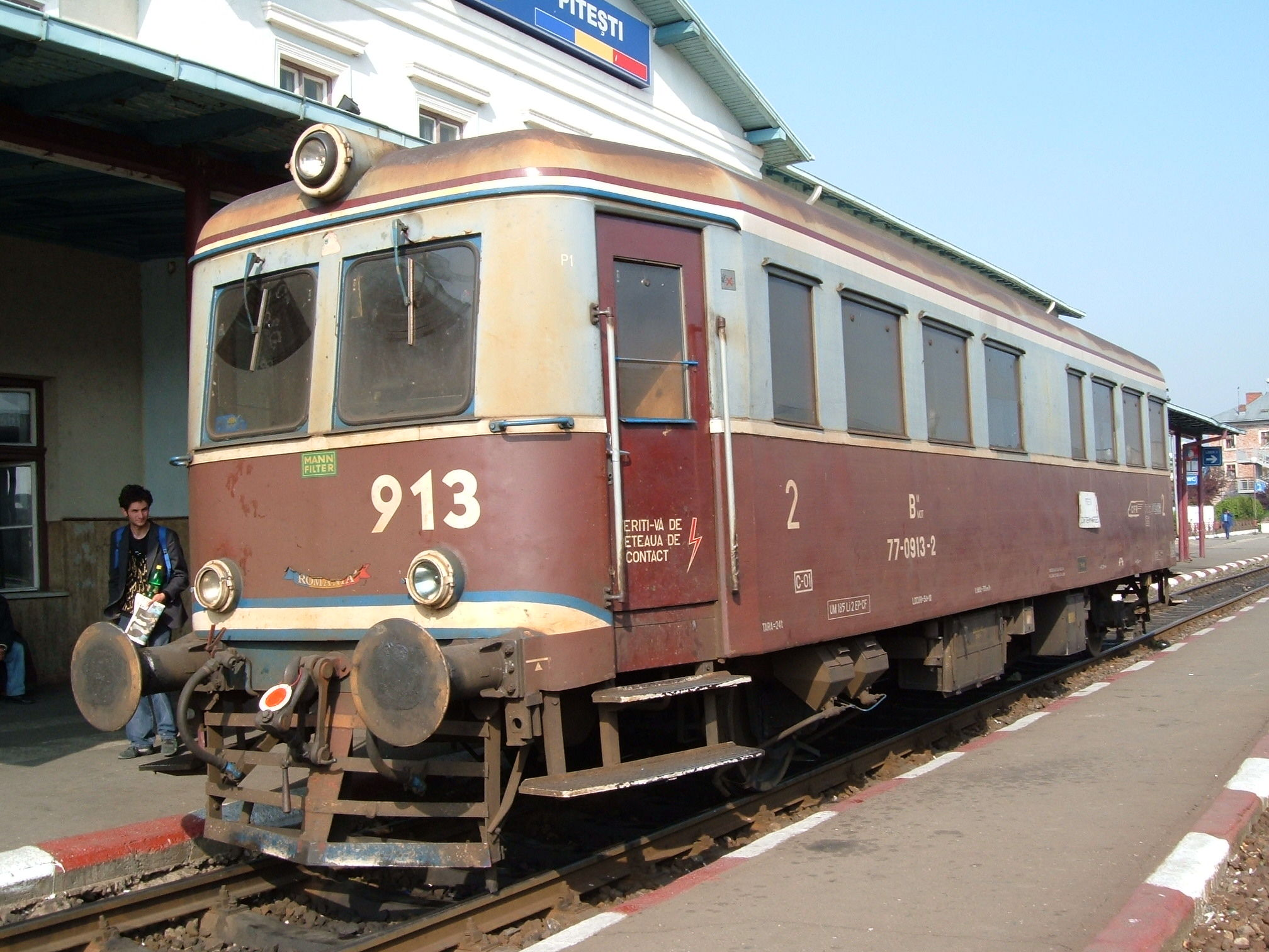 Automotor CFR 77-0913-2 în gara Pitești alcătuiește PM-ul de 9:45 spre Curtea de Argeș